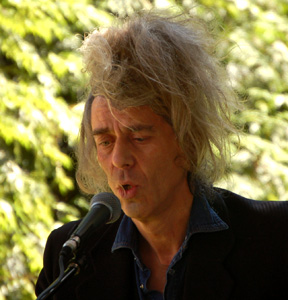 Guido Belcanto op het Stadsmuzikantenfestival Tongeren.